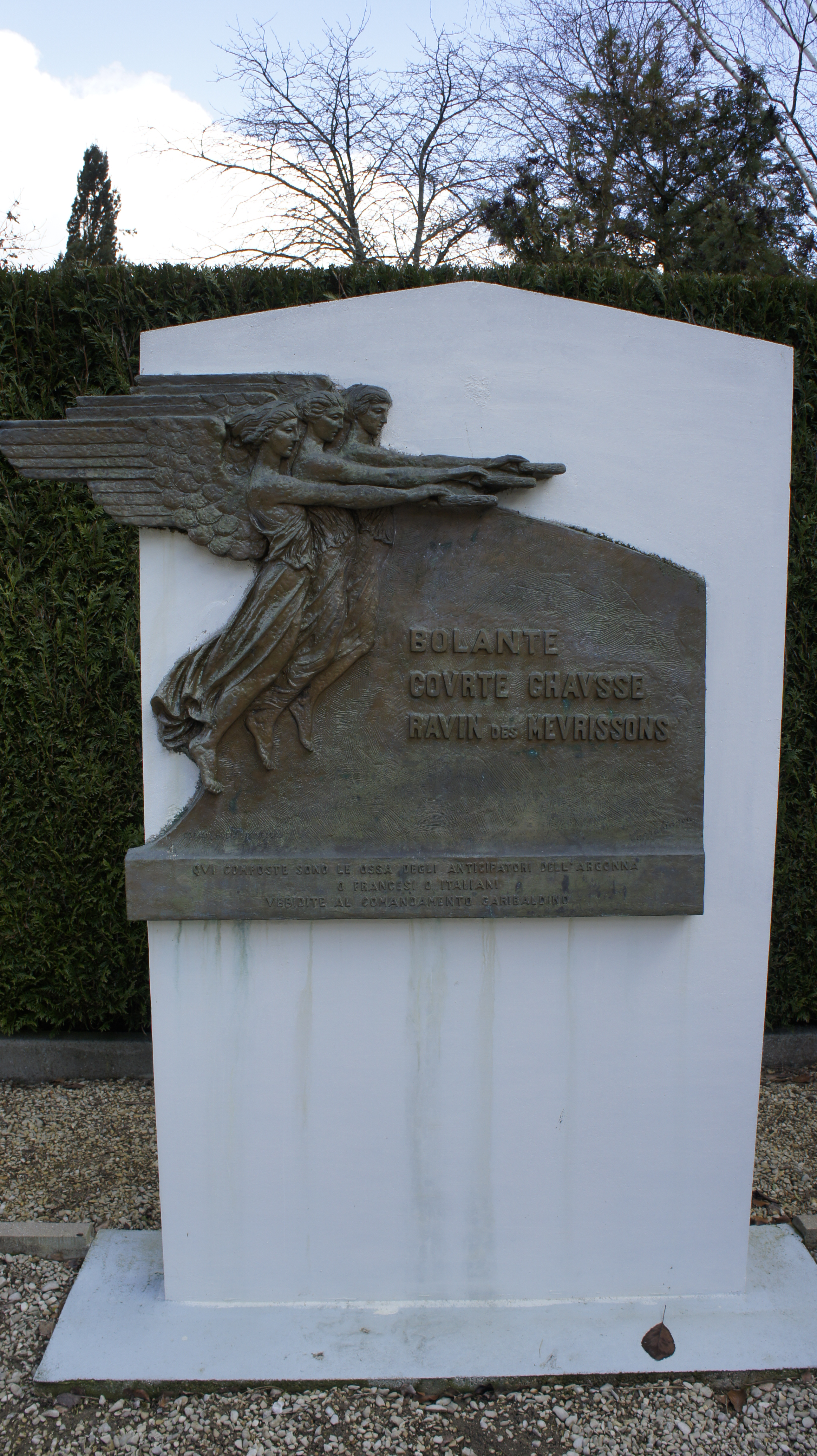 Monument en honneur à la Légion garibaldienne pour son action en Argonne en 1914 et 1915. Le texte : "BOLANTE COVRTE CHAVSSE RAVIN DES MEVRISSONS QUI COMPOSTE SONO LE OSSA DEGLIS ANTICIPATORI DELL'ARGONNA O FRANCESI O ITALIANI VBBIDITE AL COMANDAMETNTO GARIBALDINO".